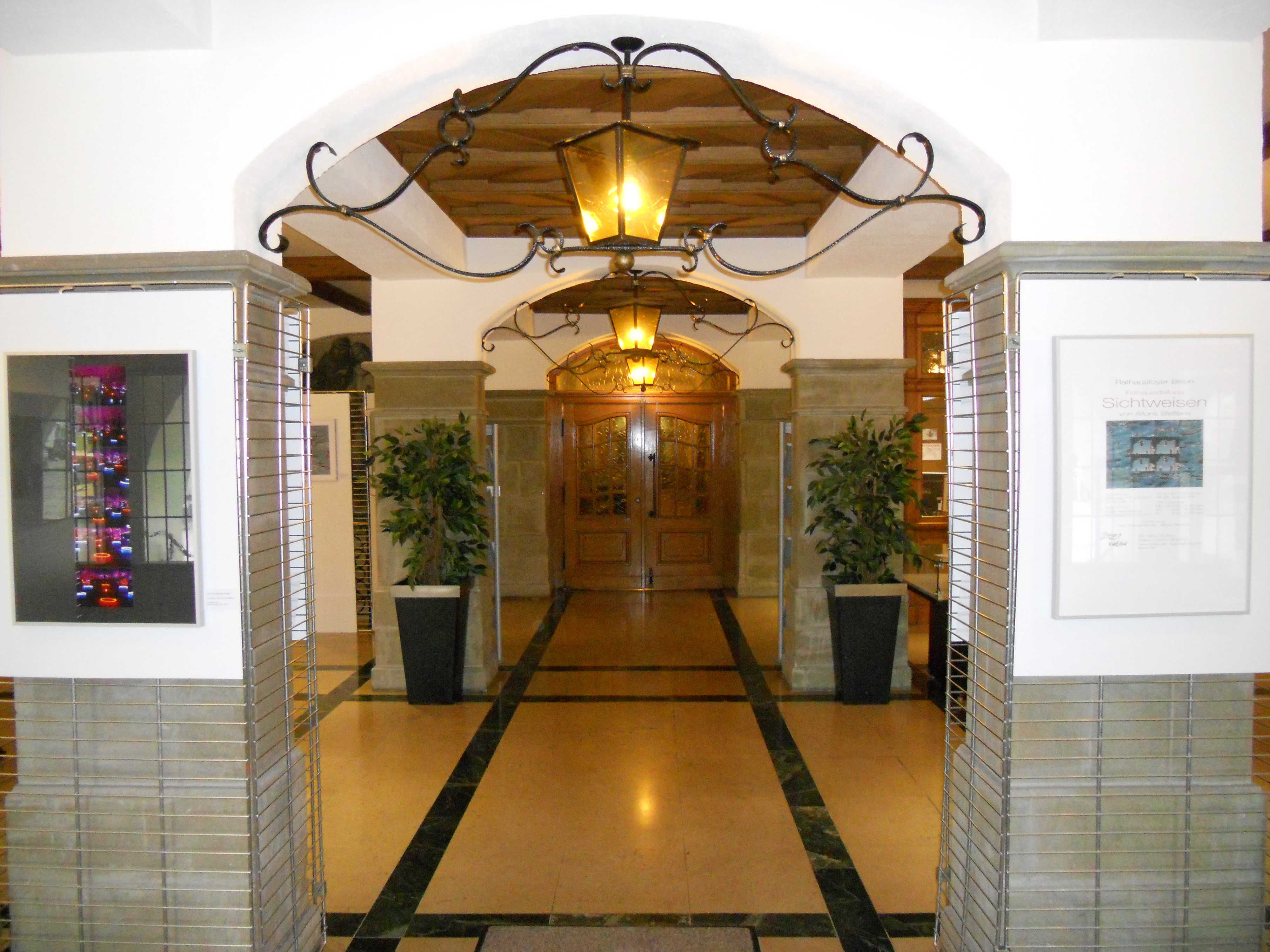 Brilon Rathaus, Innenansicht Erdgeschoß